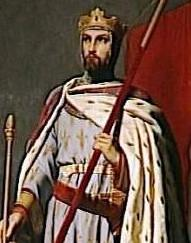 Louis VII de France, Louis VII of France